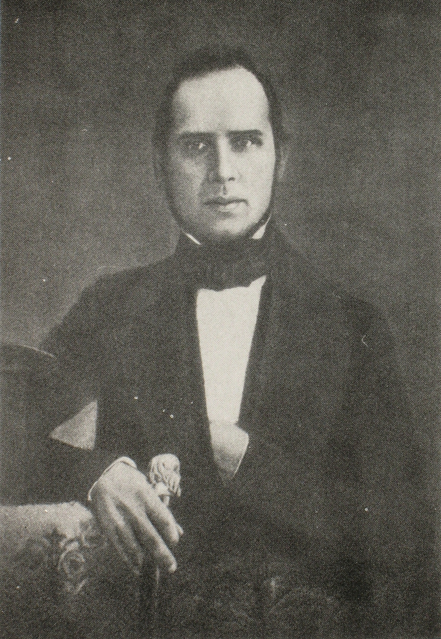 Rissian history men Petr Kudrjavtsev (dead in 1858).